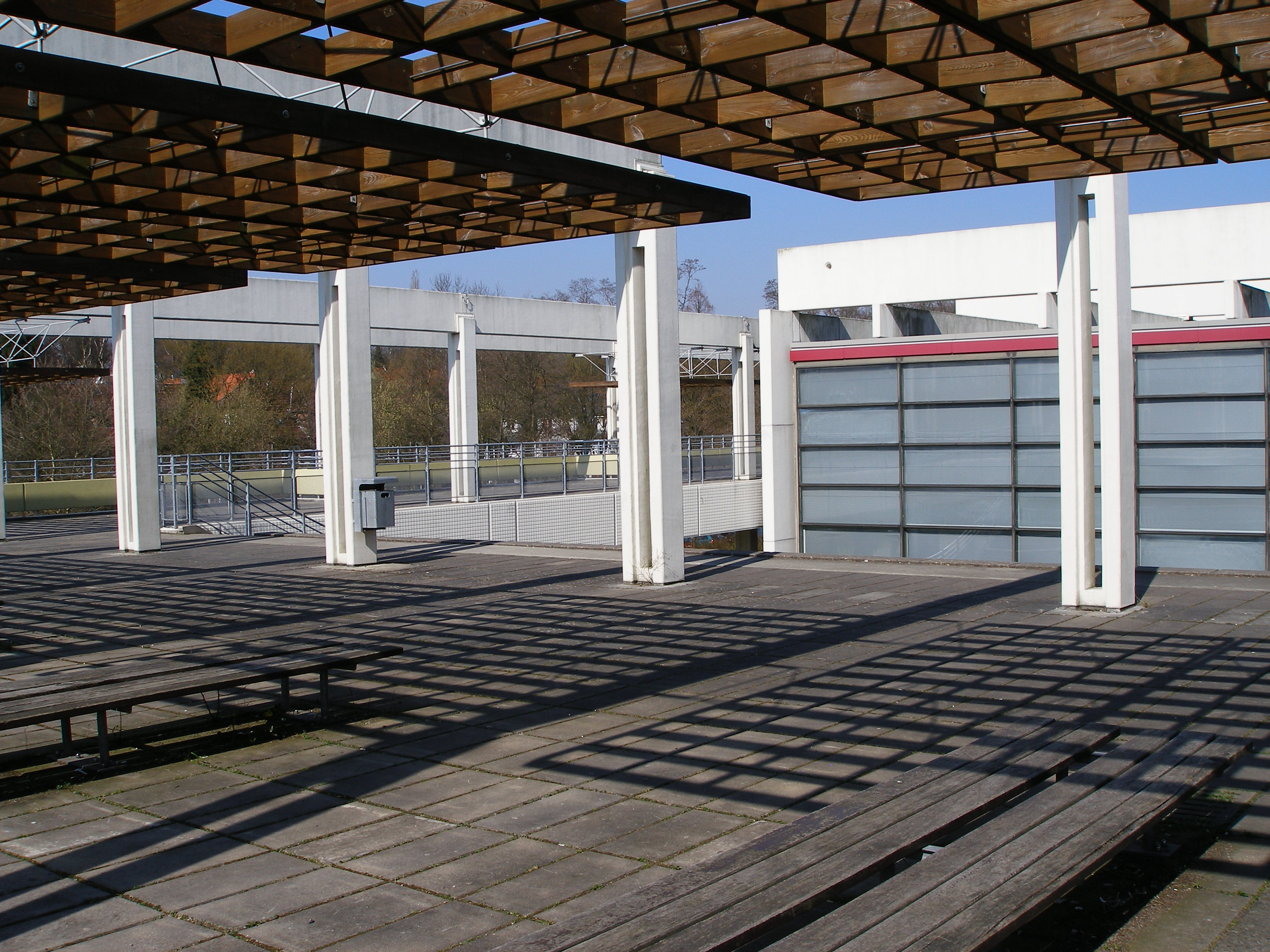 Christianeum, Hamburg; Architekt: Arne Jacobsen